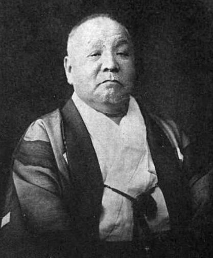 朝吹英二（あさぶきえいじ）